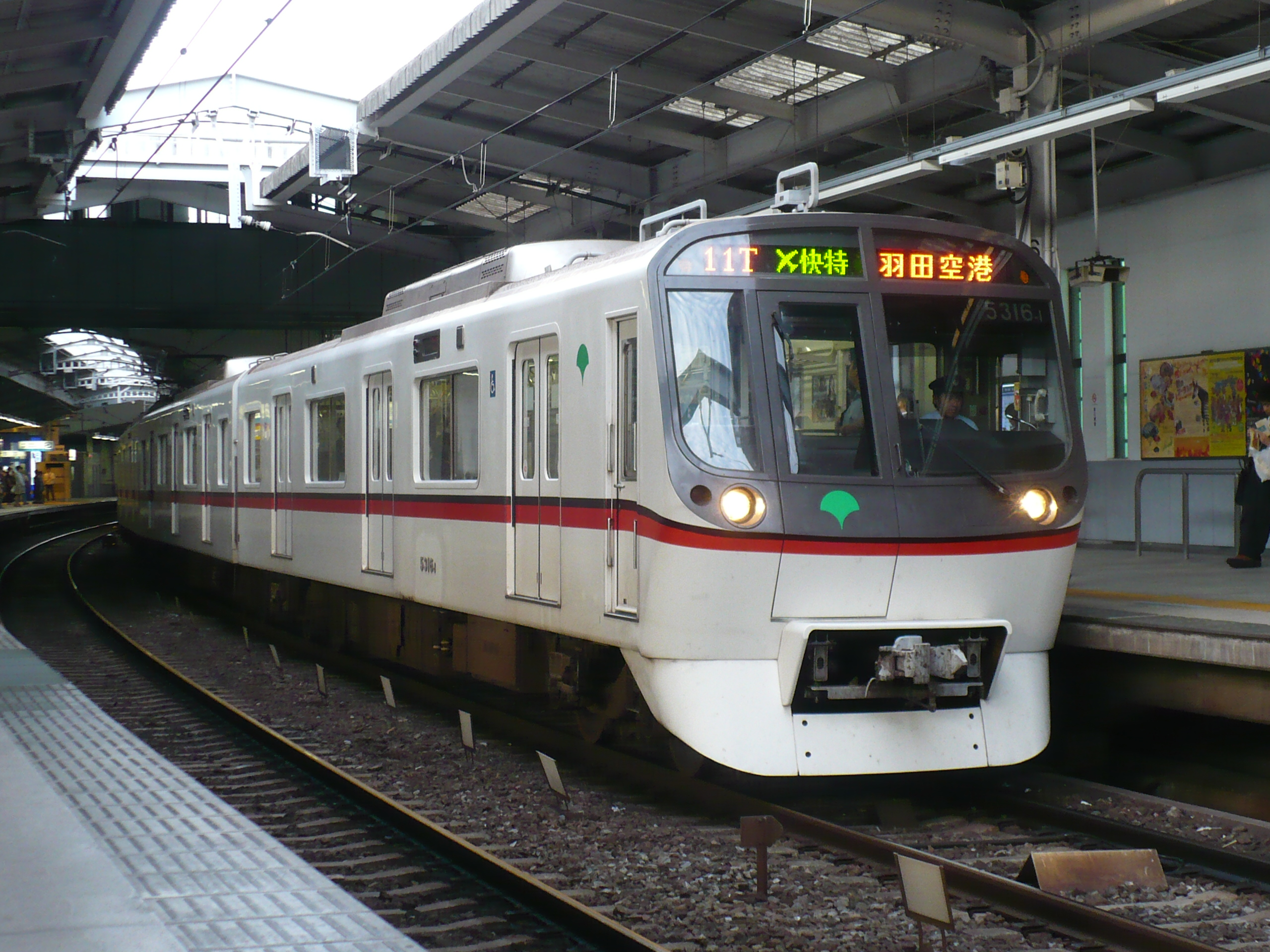 都営5300形